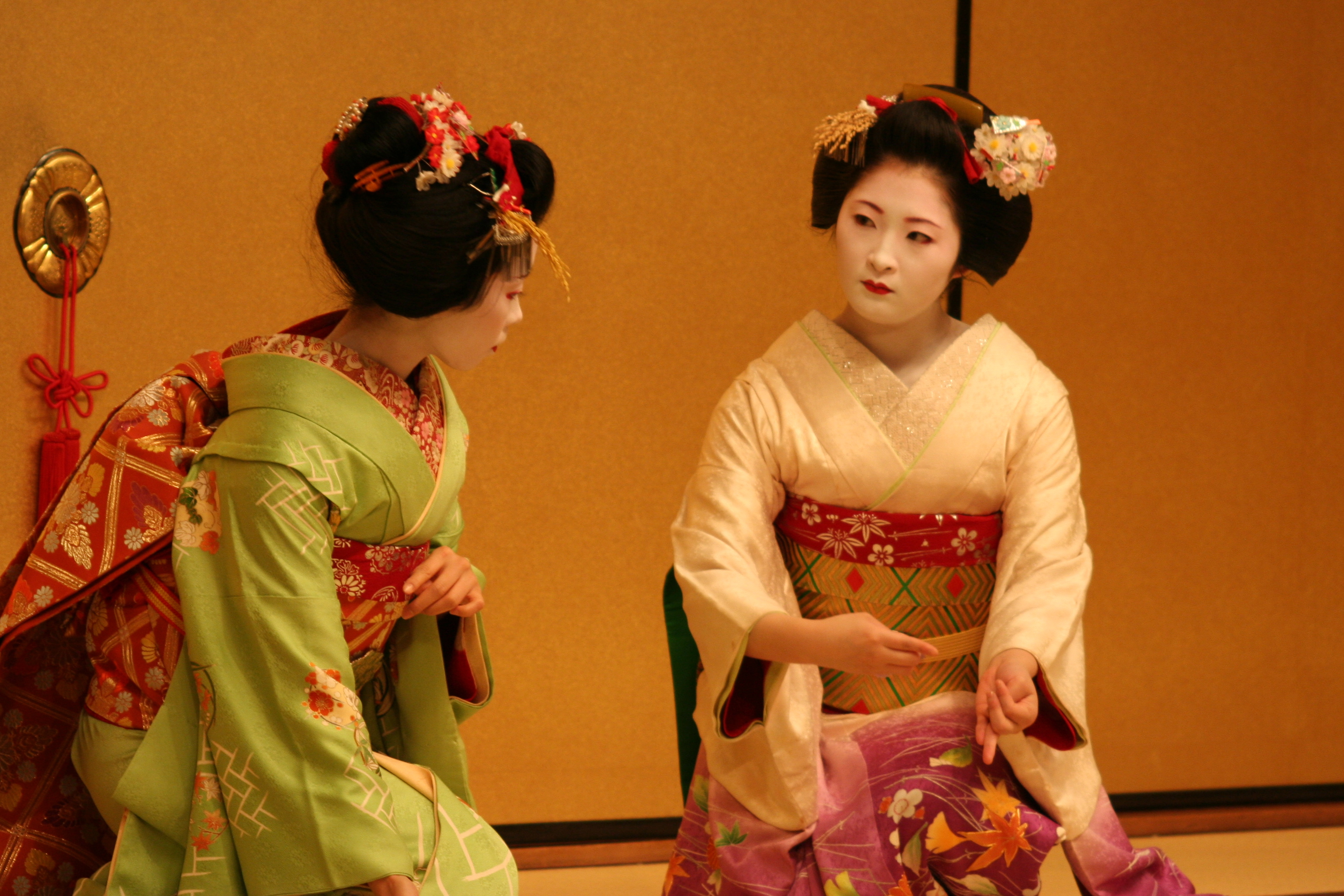 Maiko Katsugiku and Ayakazu (in green) dance